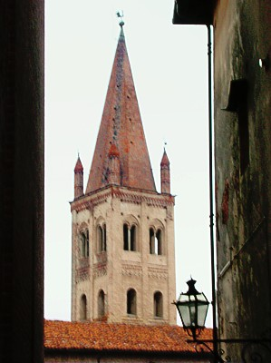 Campanile della Chiesa di San Giovanni a Saluzzo